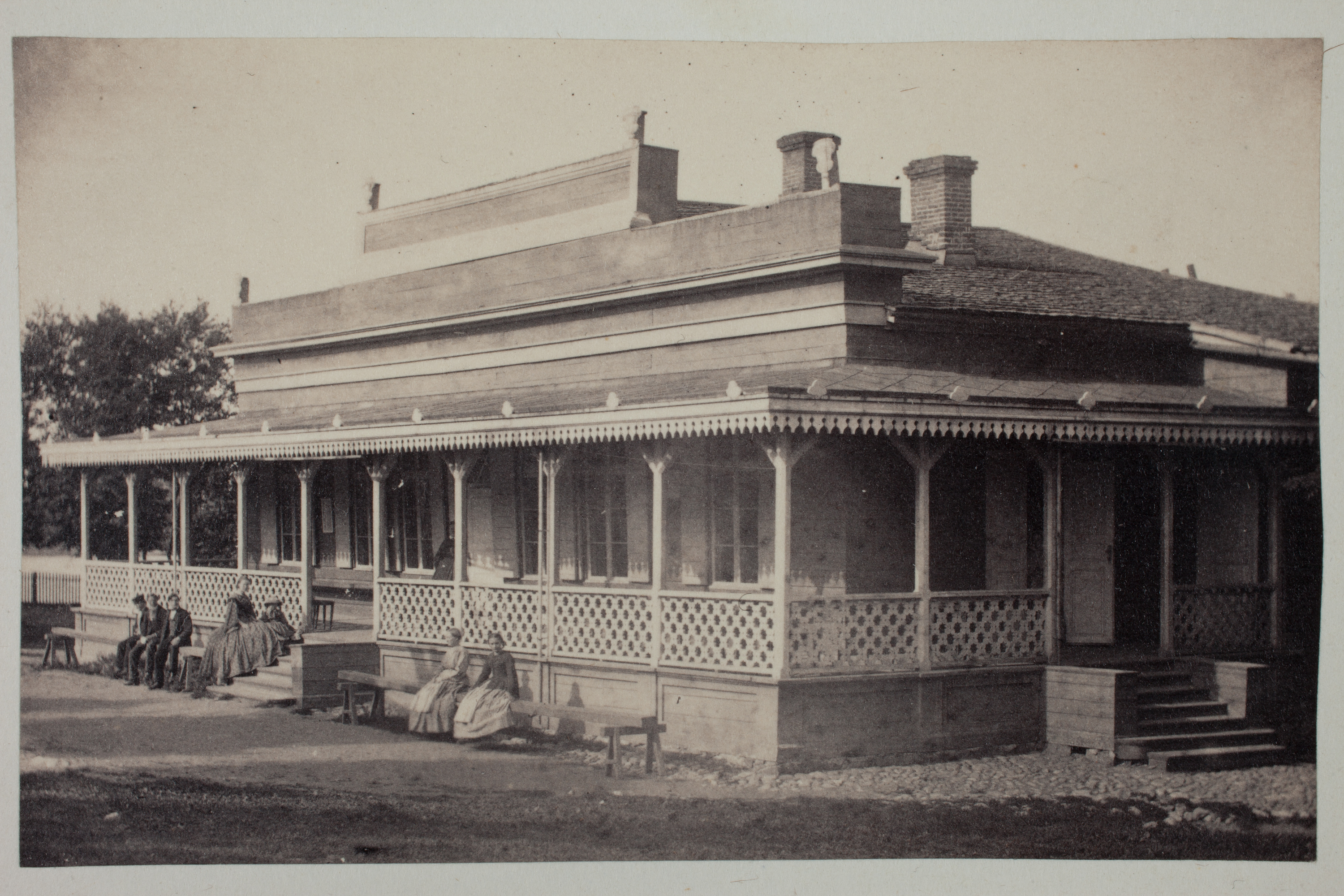 Kajsaniemi restaurang 1862. Foto: N.P. Michaelis slsa1064_1 Ur boken Helsingfors i ord och bild Utgiven av Svenska litteratursällskapet i Finland, 2012